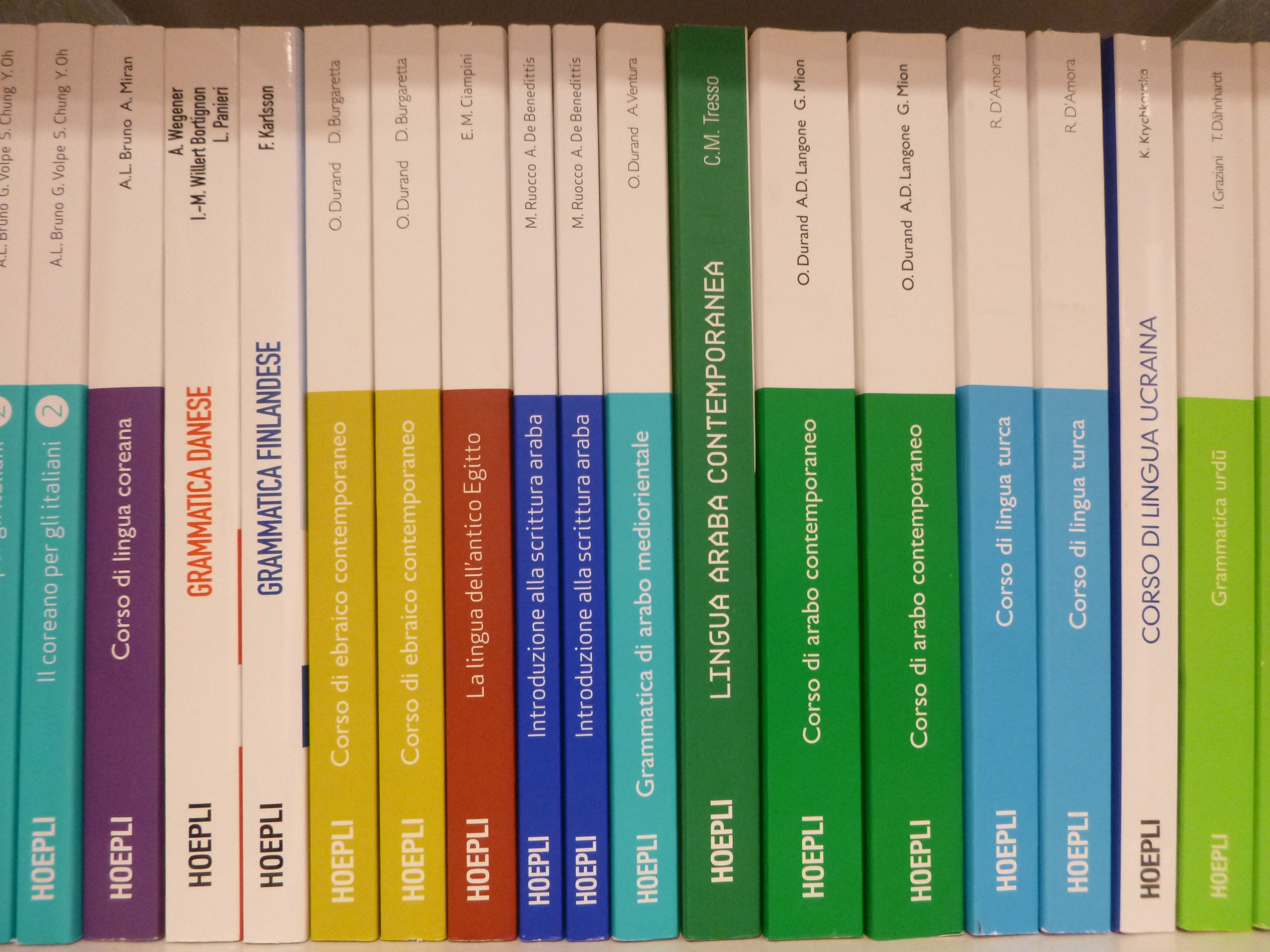 Hoepli-Buchrücken von Sprachlehrmitteln in einer Buchhandlung